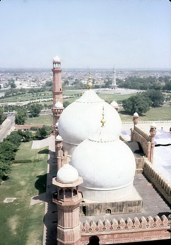 Pakistan_Lahore_mosquée-pr